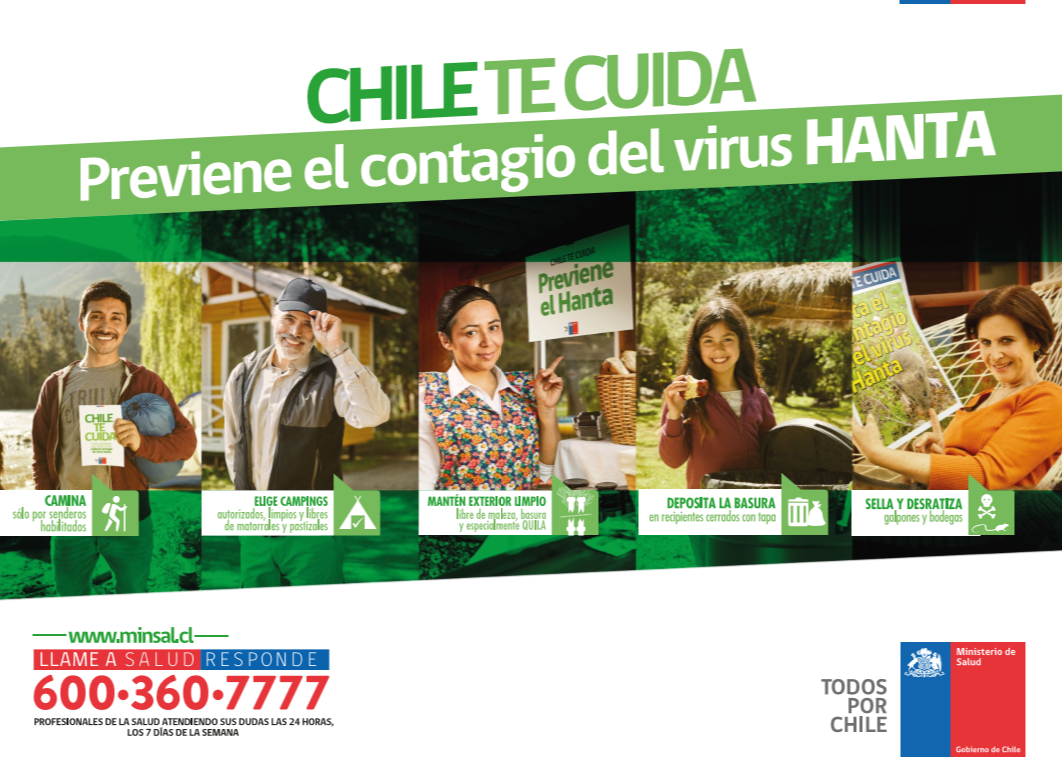 Afiche del año 2015 hecho por el Ministerio de Salud de Chile para difundir medidas para la prevención del contagio de virus hanta.